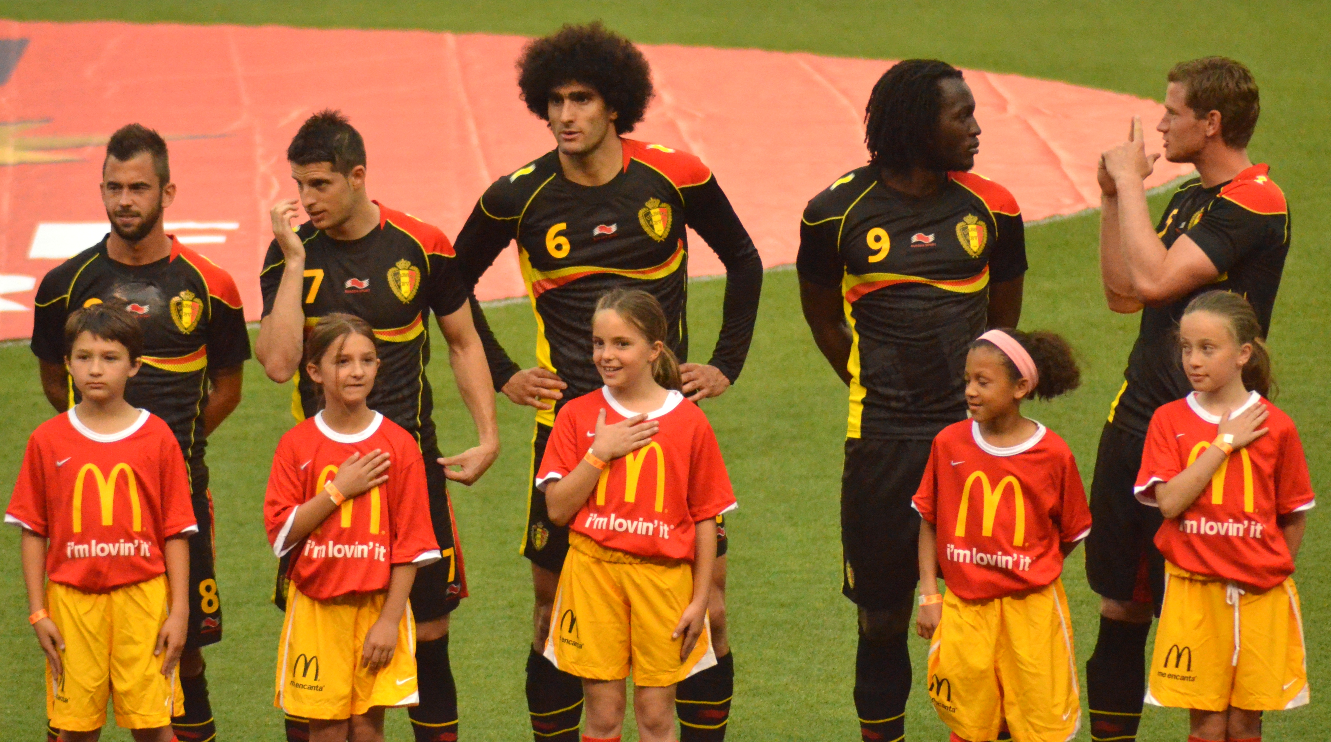 Steven Defour, Kevin Mirallas, Marouane Fellaini, Romelu Lukaku, Jan Vertonghen